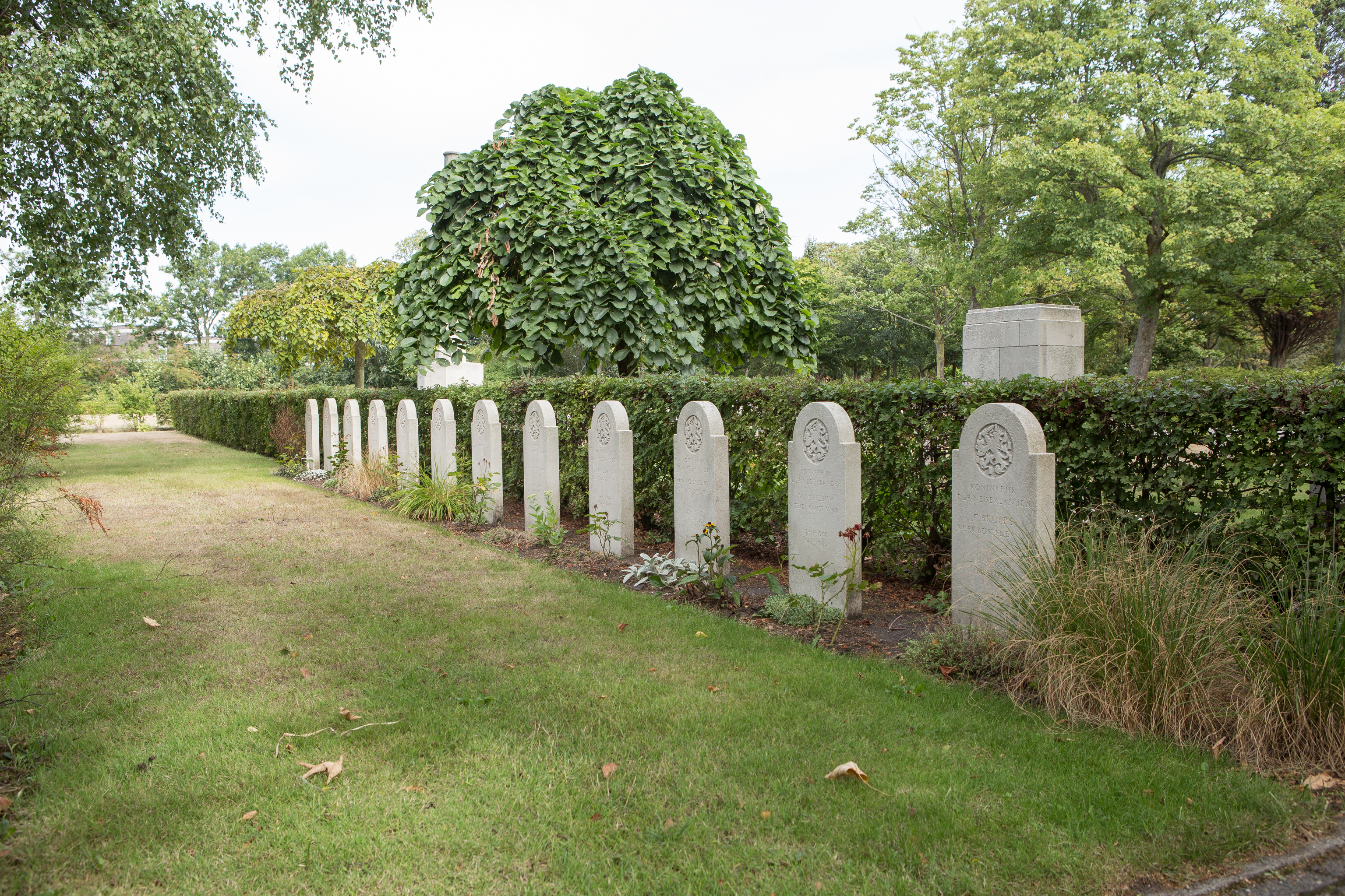 Flushing (Vlissingen) Northern Cemetery